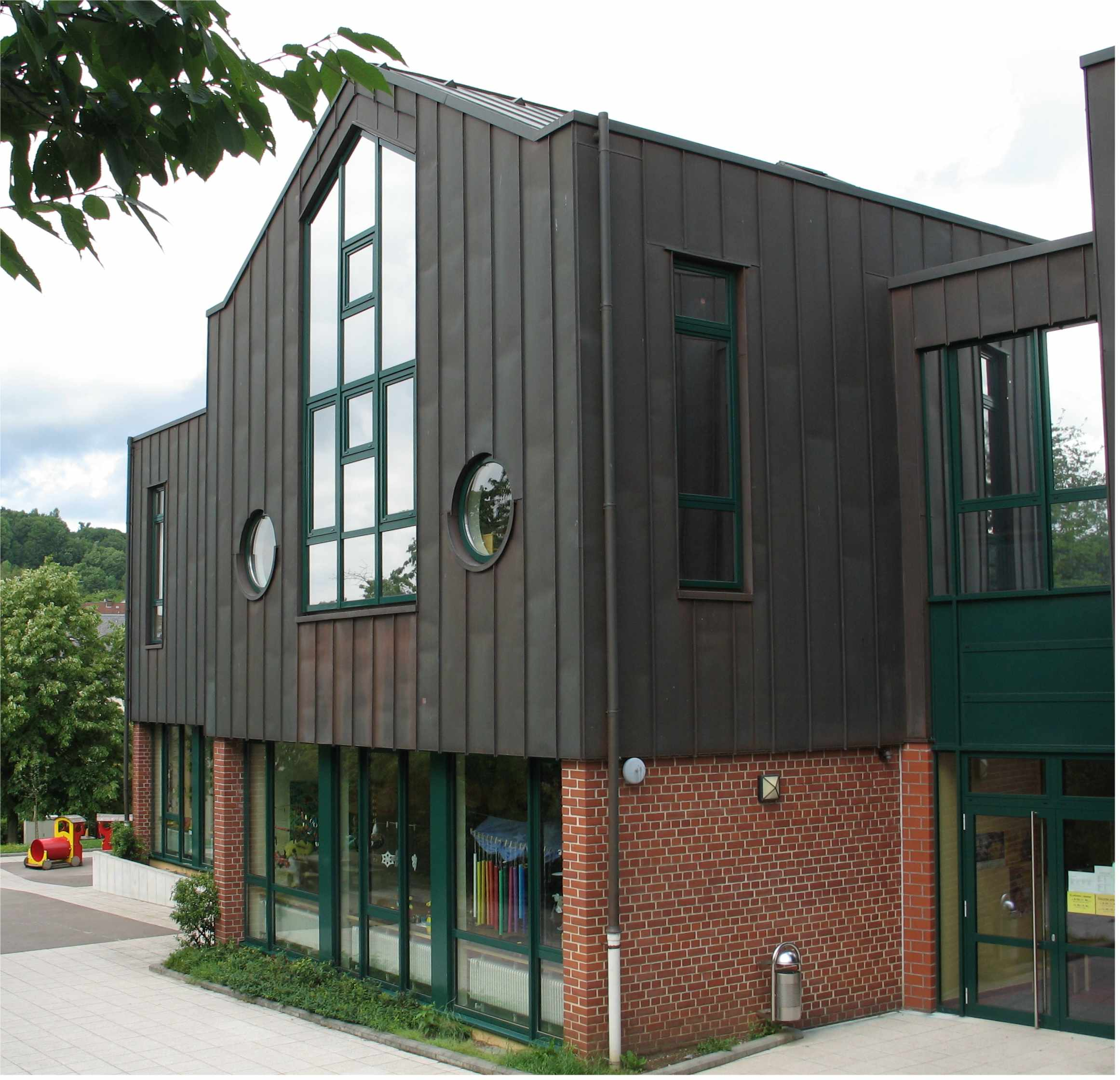 Spillschoul vu Lëntgen Kategorie:Gemeng Lëntgen